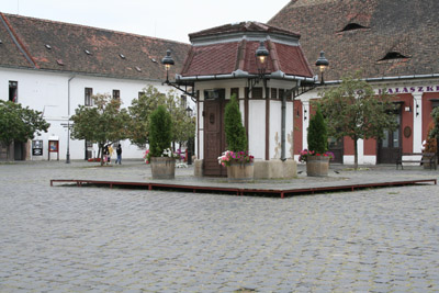 Main Square in Obuda, Budapest